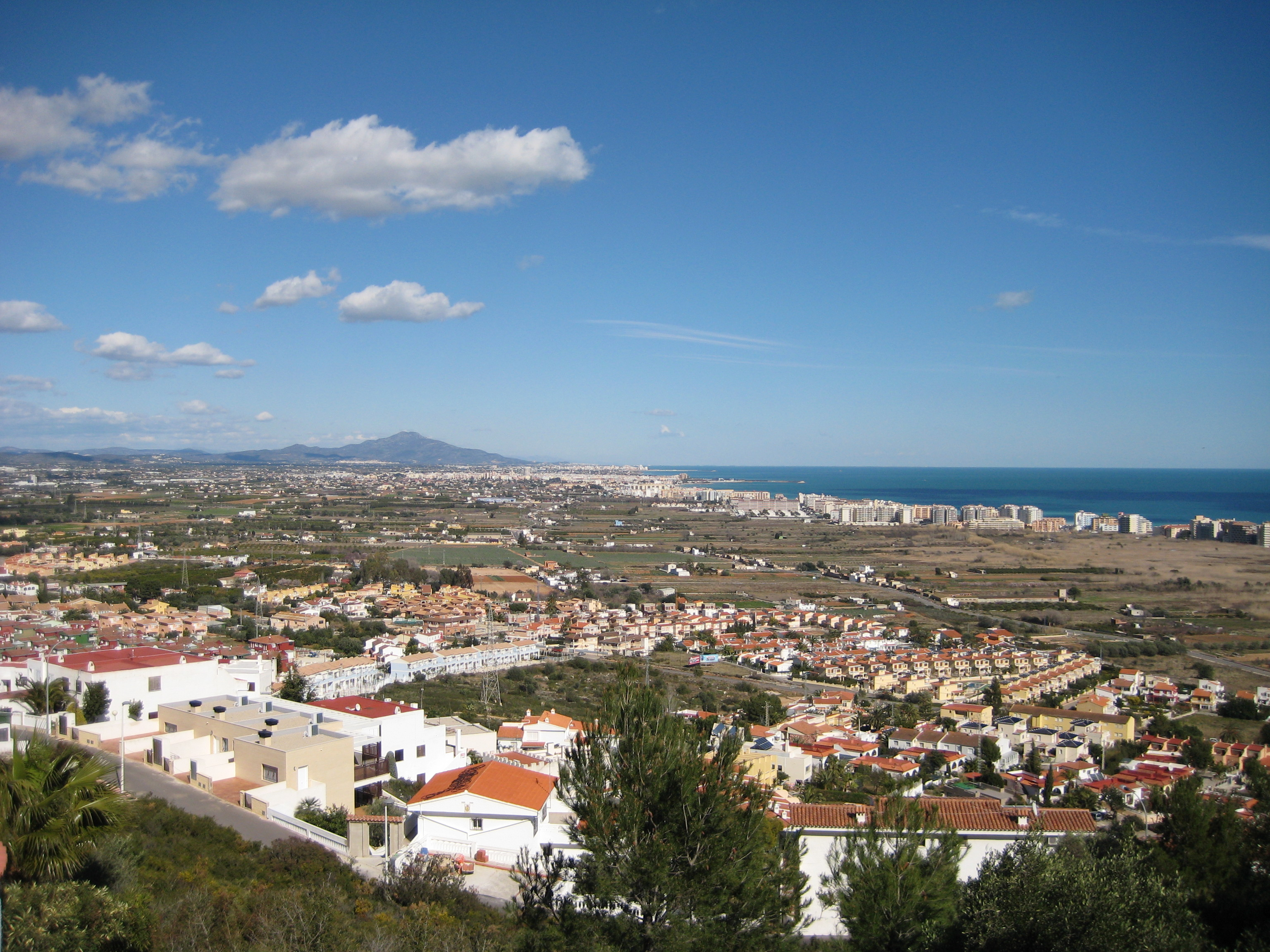 Plana de Vinaròs des de les Talaies (Serra d'Irta) de Peníscola (Baix Maestrat)